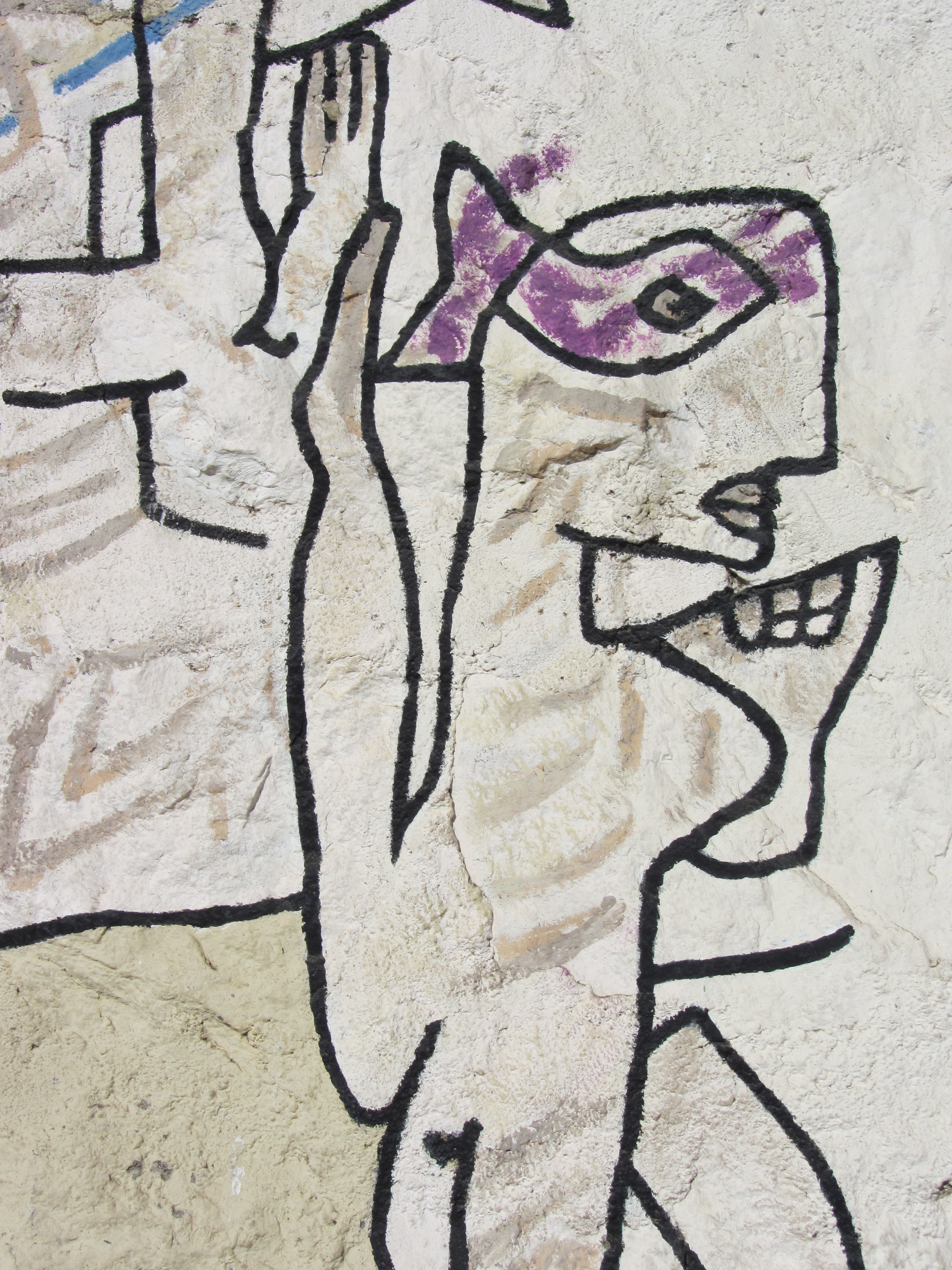 Mural nº10 del Museo a Cielo Abierto de Valparaíso, titulado Surrealismo en roca, hecho por Roberto Matta en 1992